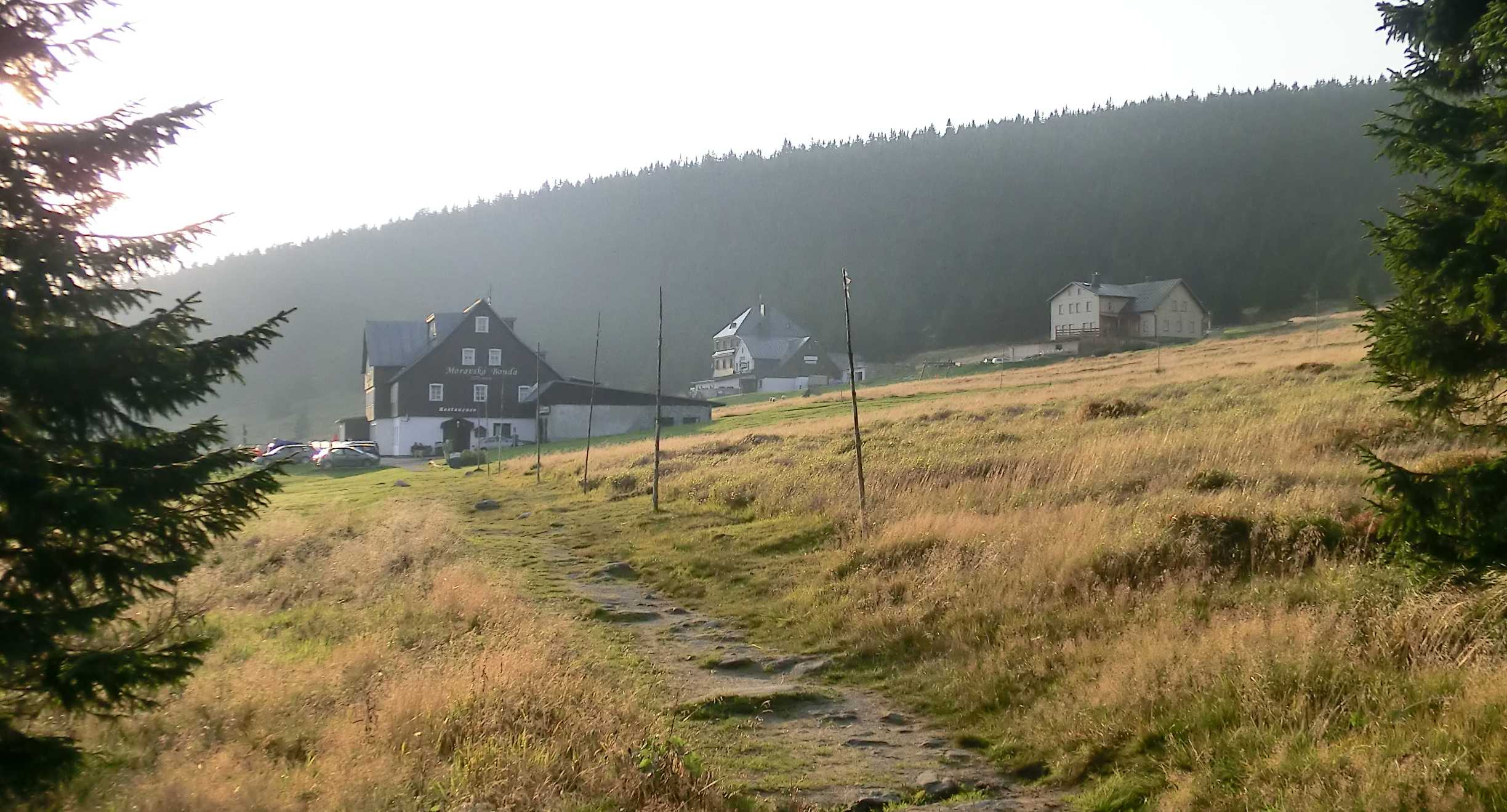 Moravská bouda, chata Vatra a chata Spindler